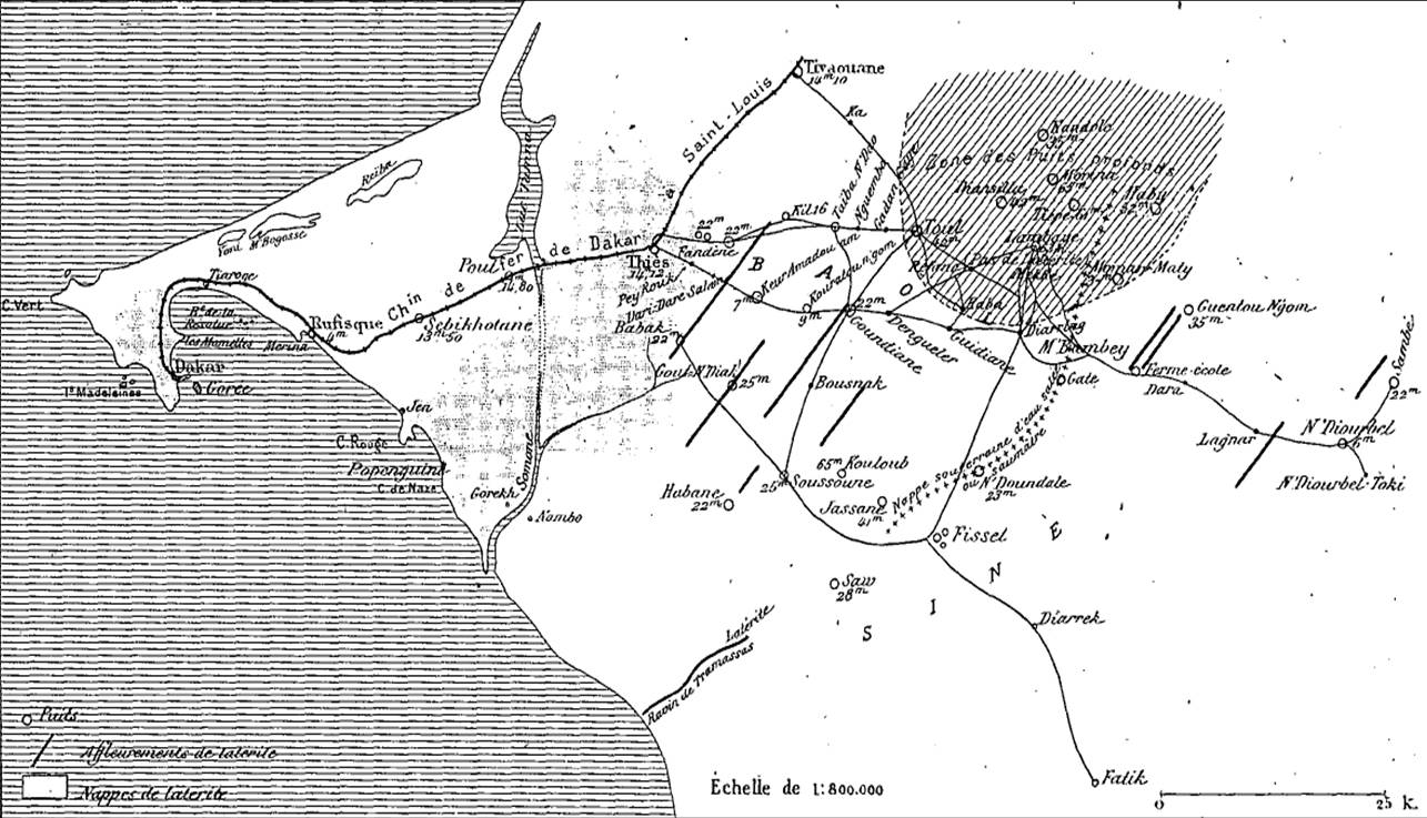 Carte géologique : "Puits du Baol et affleurements de latérite", dans La Géographie, tome IV, 15 juillet 1901, p. 17